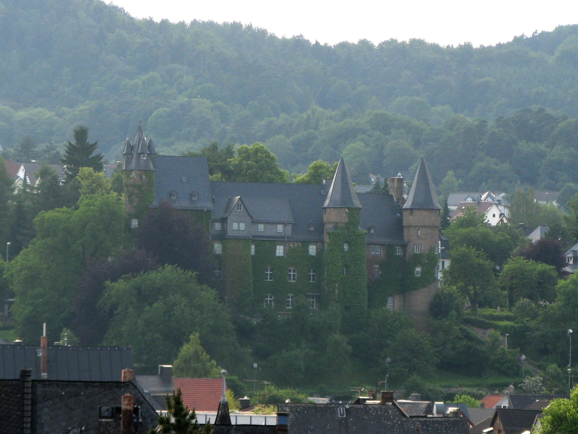 Gesamtansicht des Schlosses Herborn